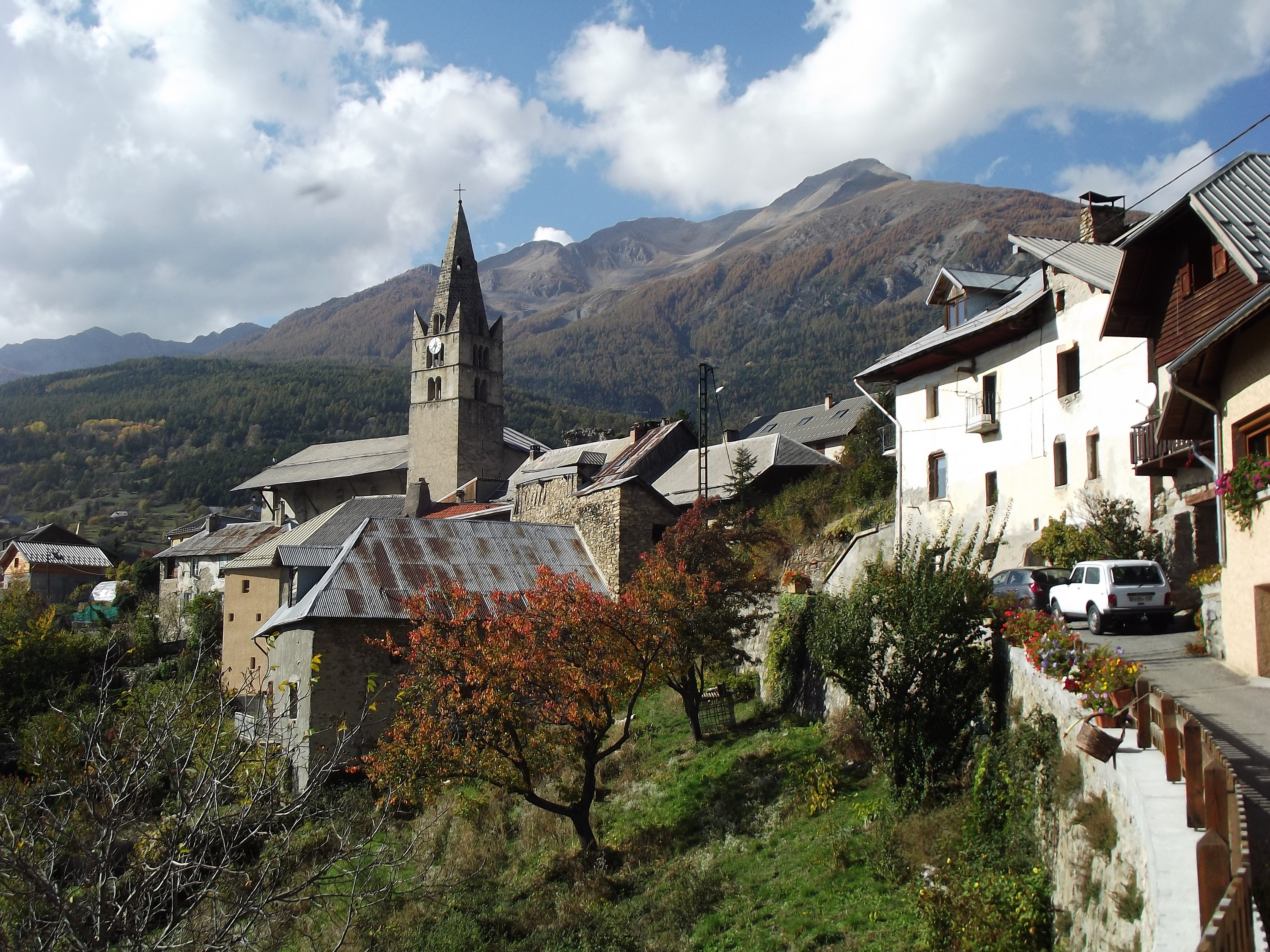 Village de Saint-Marcellin (Châteauroux-les-Alpes)